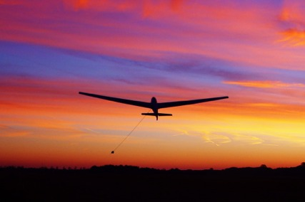 Zweefvliegtuig (ASK-13) tijdens een lierstart op Vliegveld Haamstede in de vroege ochtend